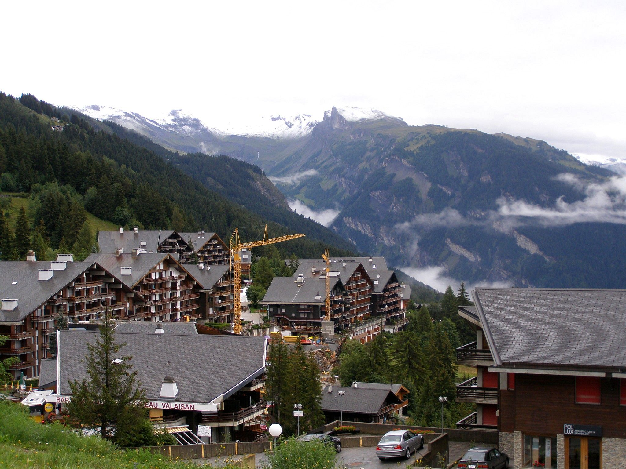 Celkový pohľad